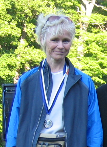 Marje Viirmann